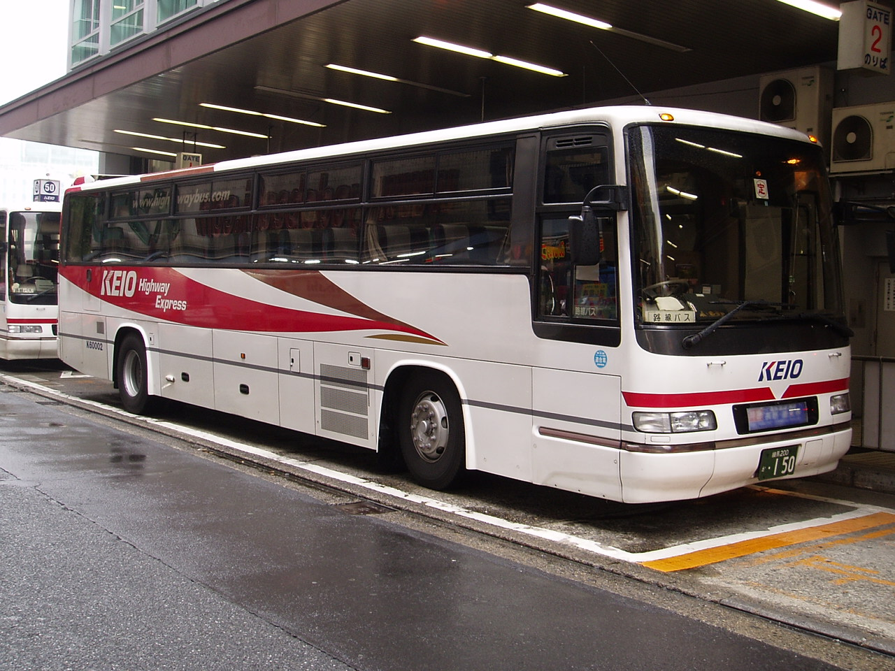 Keio Dentetsu Bus K60002 Hino KC-RU3FSCB at Shinjuku Highway Bus Terminal